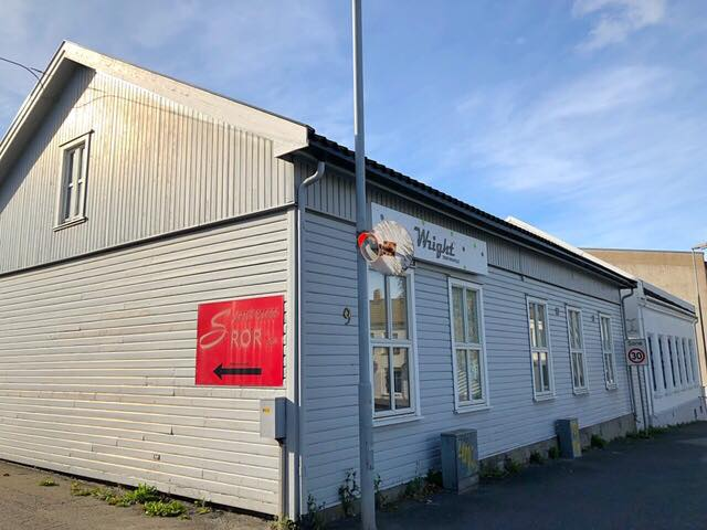 Welhavens gate 9